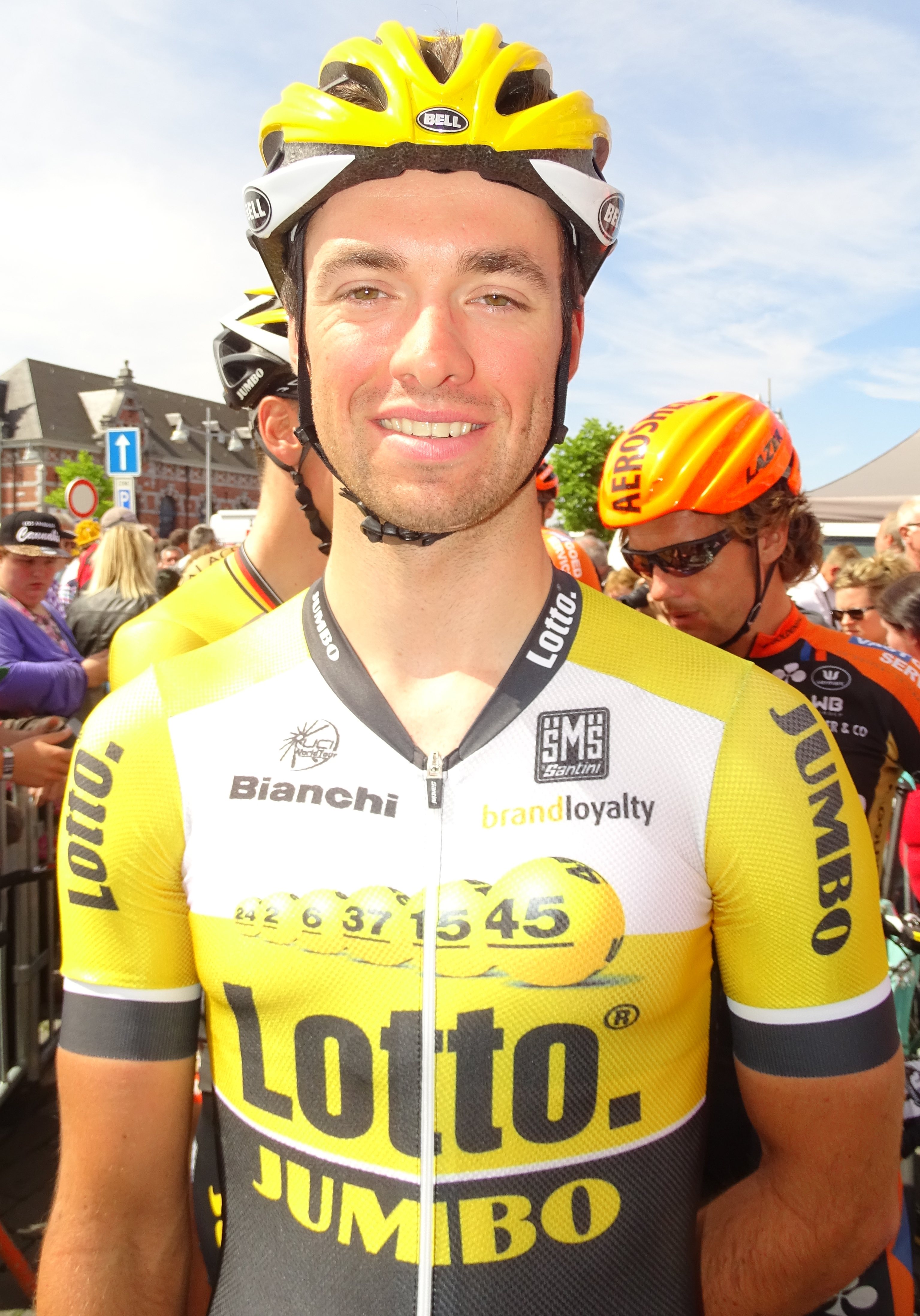 Reportage réalisé le mercredi 22 juillet à l'occasion du départ du Grand Prix Pino Cerami 2015 à Saint-Ghislain, Belgique.